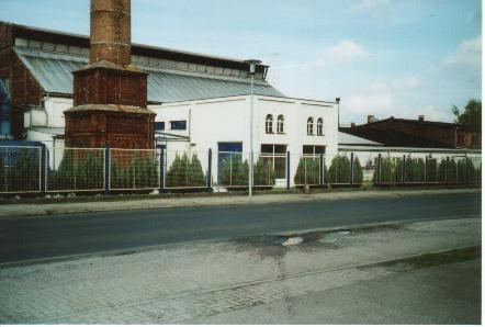 Sovitec Glasperlen GmbH in Schönborn, Deutschland.